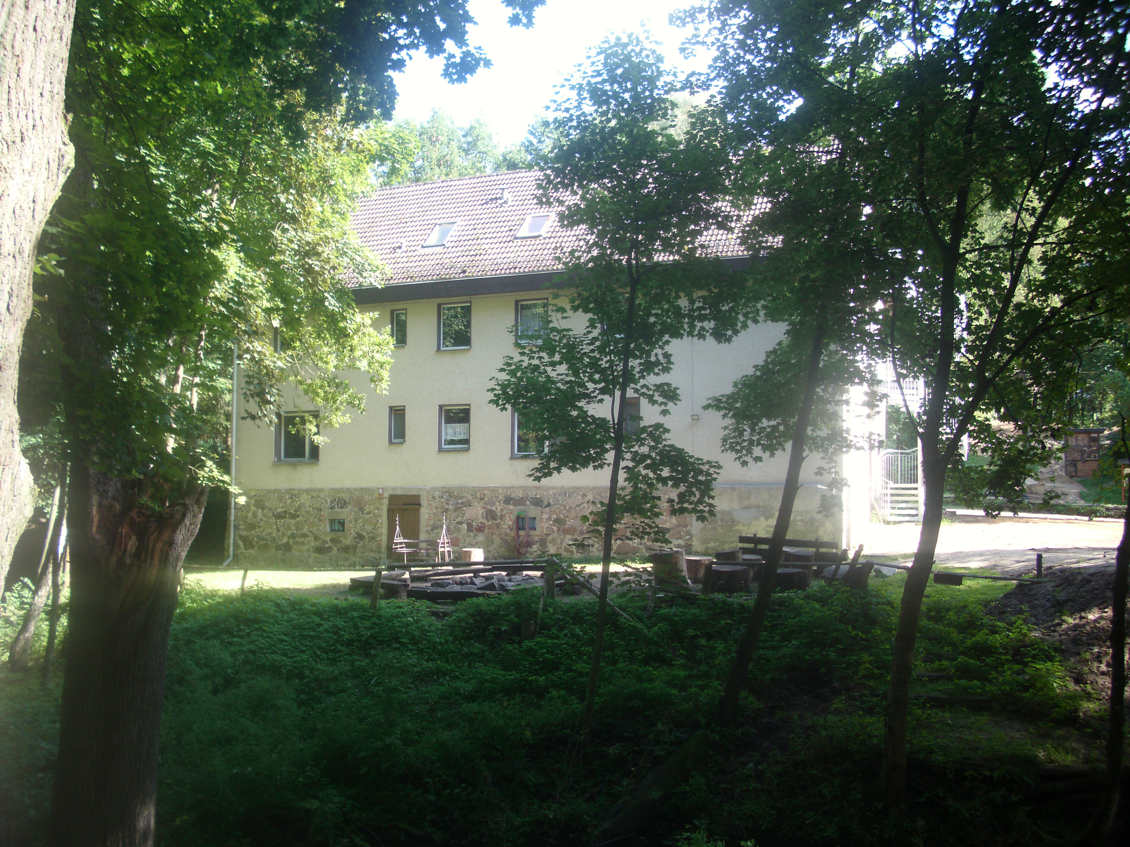 ehemaliges Wohnhaus der Schlaubemühle, heute Naturschutz- und Informationszentrum des Bundes für Umwelt und Naturschutz Deutschland (BUND)